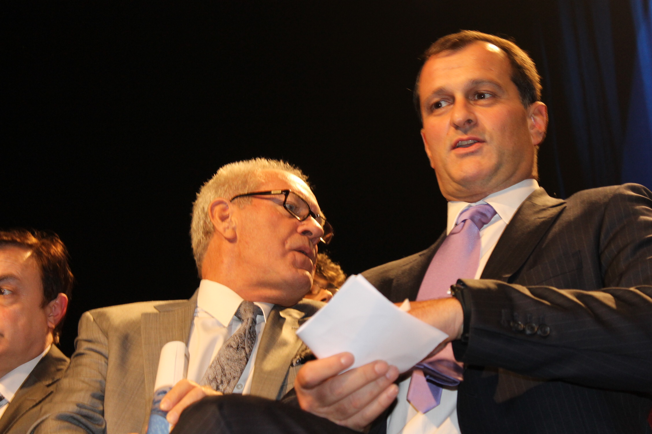 Photo de Louis Aliot (au premier plan) lors de la présentation du projet présidentiel de Marine Le Pen, dimanche 19 novembre 2011, à Paris 15e. Photo © 2011 G. Bouchet/Front national